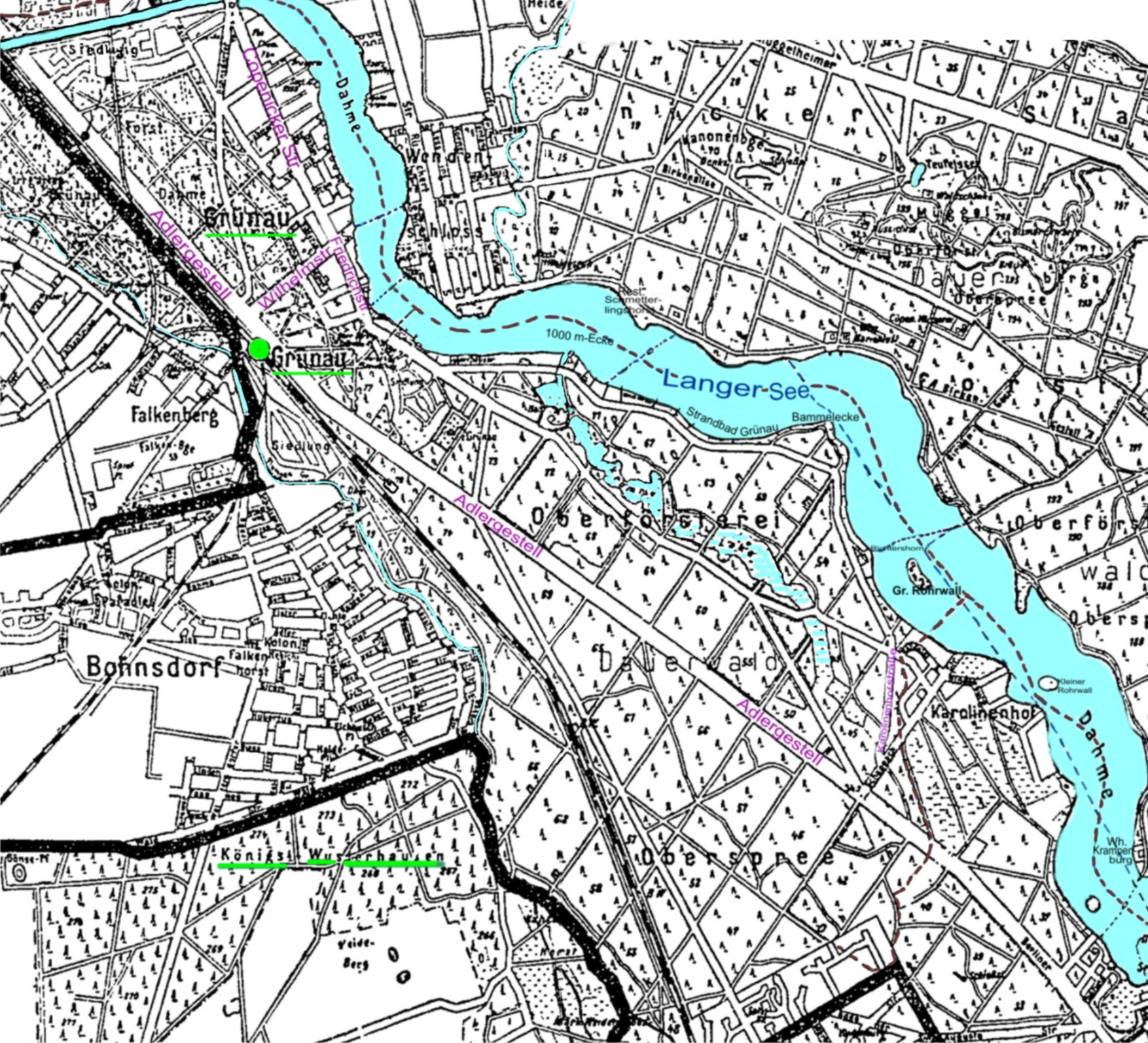 Ortsteil Grünau im Jahr 1923